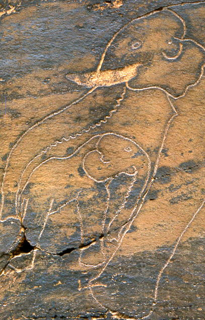 Gravures préhistoriques de la région d'Aflou, Algérie